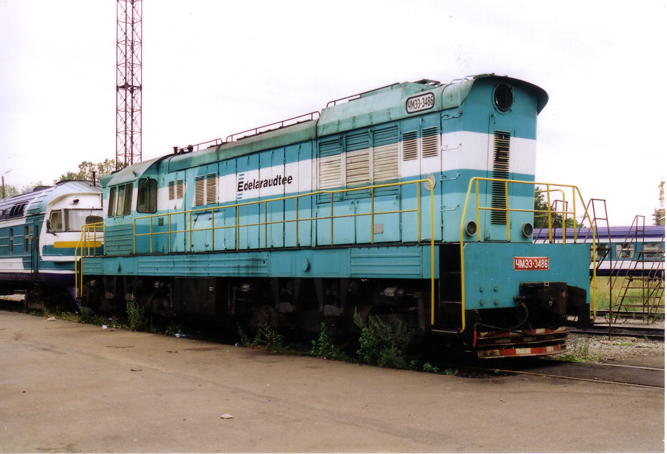 Czech-built shunter at Tallinn-Väike depot, Estonia